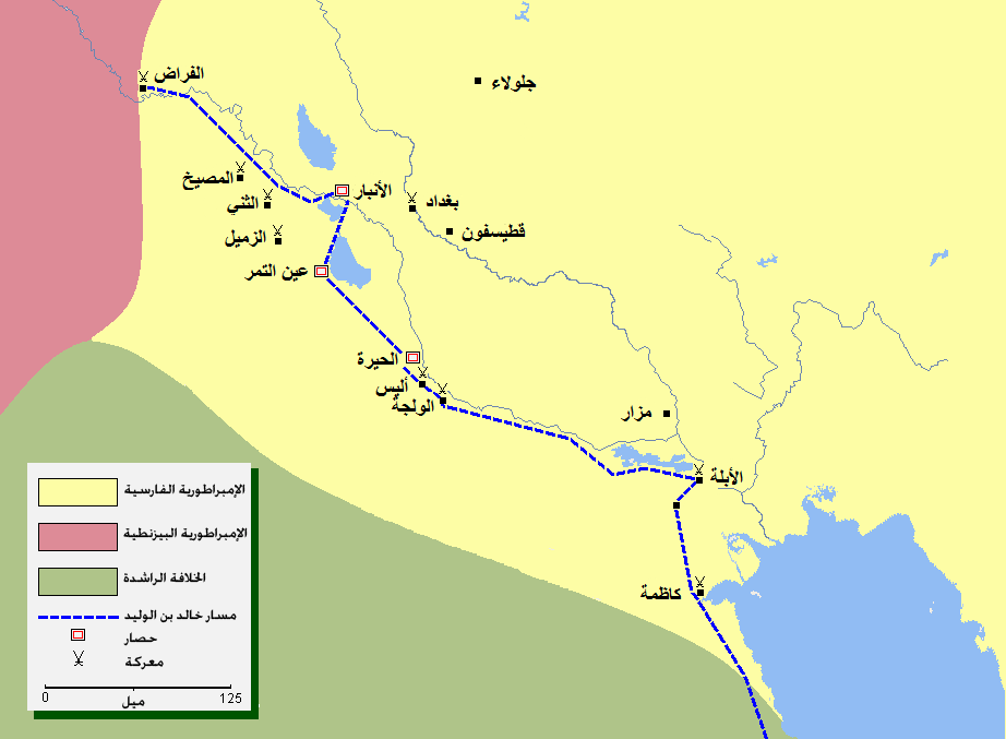 خريطة الفتح الإسلامي للعراق على يد خالد بن الوليد.